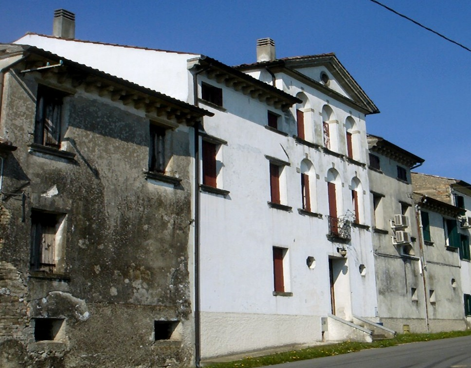 Ogliano di Conegliano (Treviso): Villa Gera detta Palazzo degli Angeli (XVIII secolo), complesso padronale di località Caselonghe.